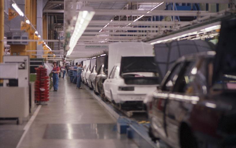 Juni 1988 Stuttgart, Daimler-Benz-Werk in Untertürkheim